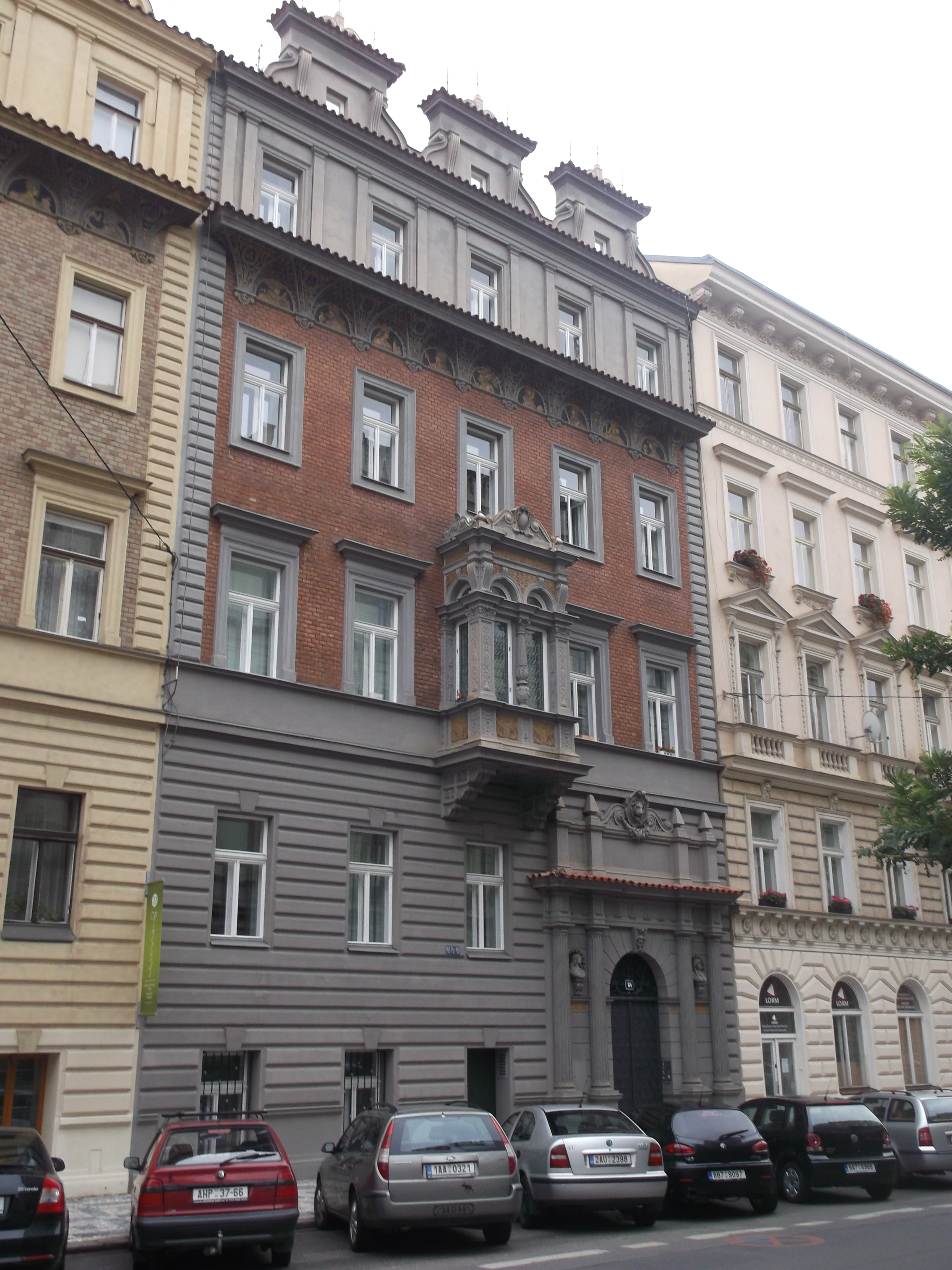 Praha 5-Malá Strana, Zborovská 115/64.